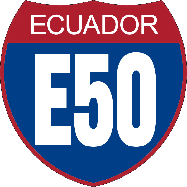 Disco de Identificación Ruta Nacional E50